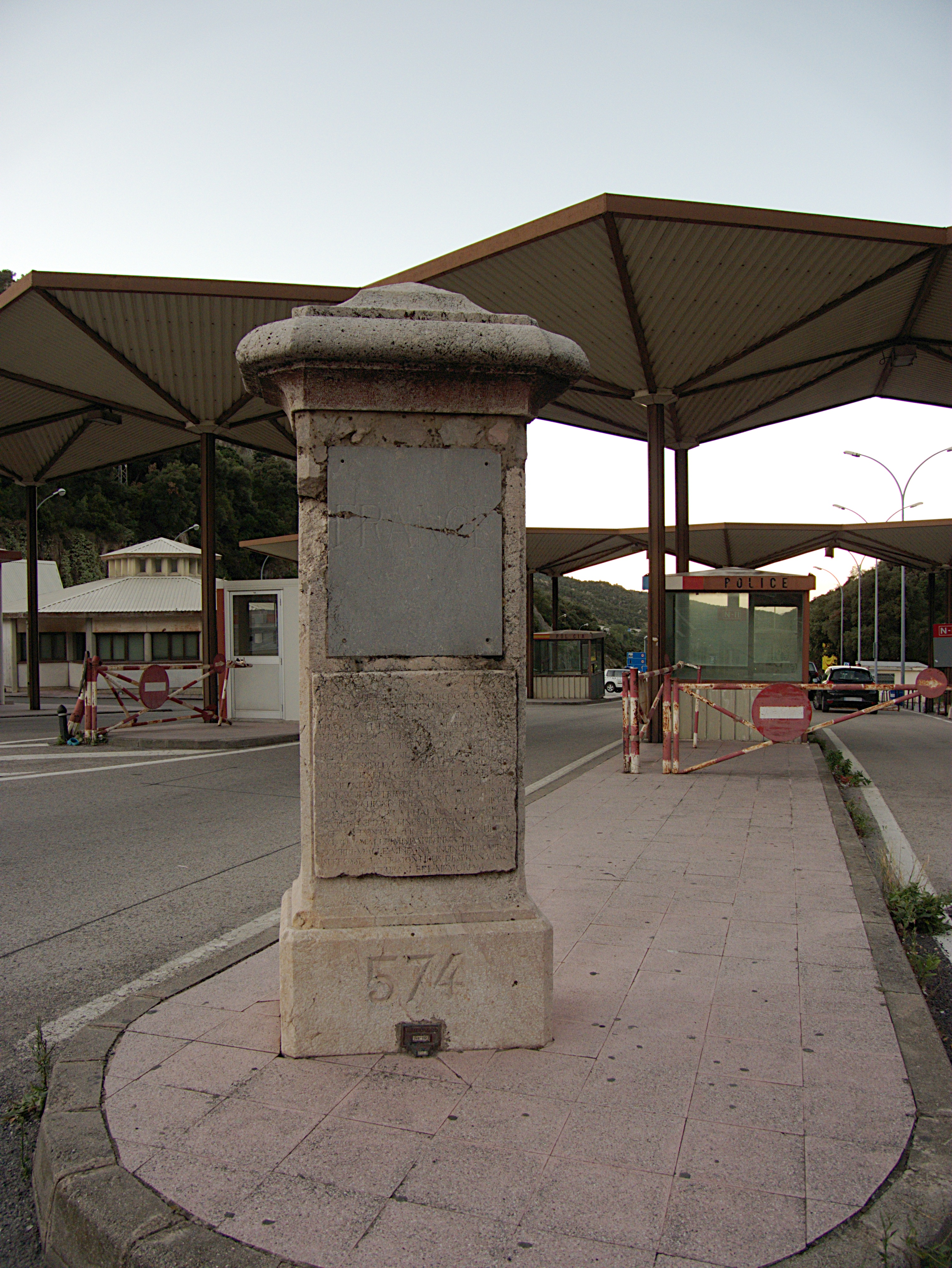 Pilier frontière n° 574, Le Perthus (Pyrénées-Orientales, Languedoc-Roussillon, France), La Jonquera (Haut-Ampurdan, Gérone, Catalogne, Espagne)